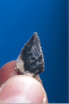 The Yarmukian Culture is a Neolithic culture of the ancient Levant. It was the first culture in Prehistoric Israel and one of the oldest in the Levant to make use of pottery. The Yarmukian derives its name from the Yarmouk River which flows near its type site at Sha'ar HaGolan, a kibbutz at the foot of the Golan Heights. The pictures are fromYosef Garfinkel excavations taken between 1989-1990 & 1998-2004 התרבות הירמוכית היא תרבות מהתקופה הניאוליתית הקרמית שמרבית שרידיה נתגלו באיזור שדות שער הגולן, והיא קיבלה את שמה על שם נהר הירמוך הזורם בסמוך. התמונת הן מחפירות שנערכו בשער הגולן על ידי הארכאולוגי יוסי גרפינקל מהאוניברסיטה העברית . נערכו 2 עונות חפירה 1990-1989, ו 1996-2004. ראש חץ מאבן צור